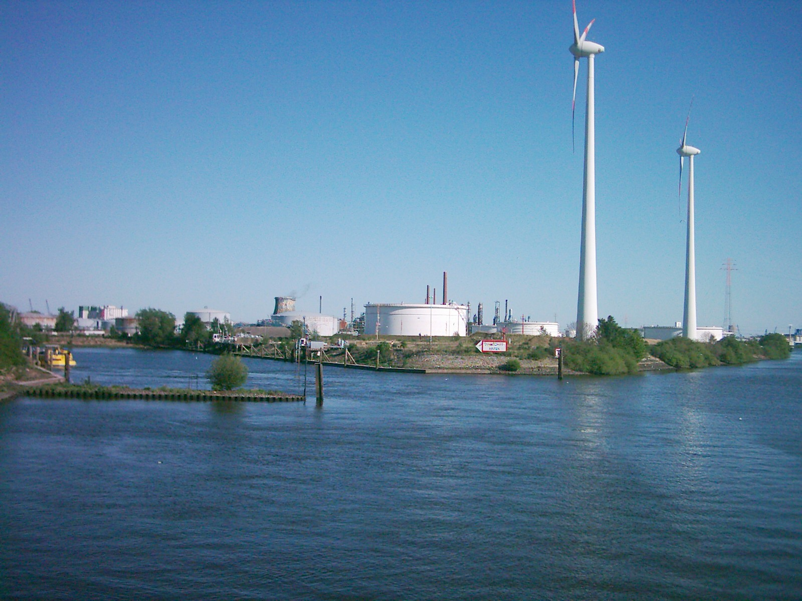 Tankschiffhafen Hohe-Schaar, Süderelbe in Höhe Kattwykbrücke, Hamburg. Im Hintergrund die Oil refinery der Shell.